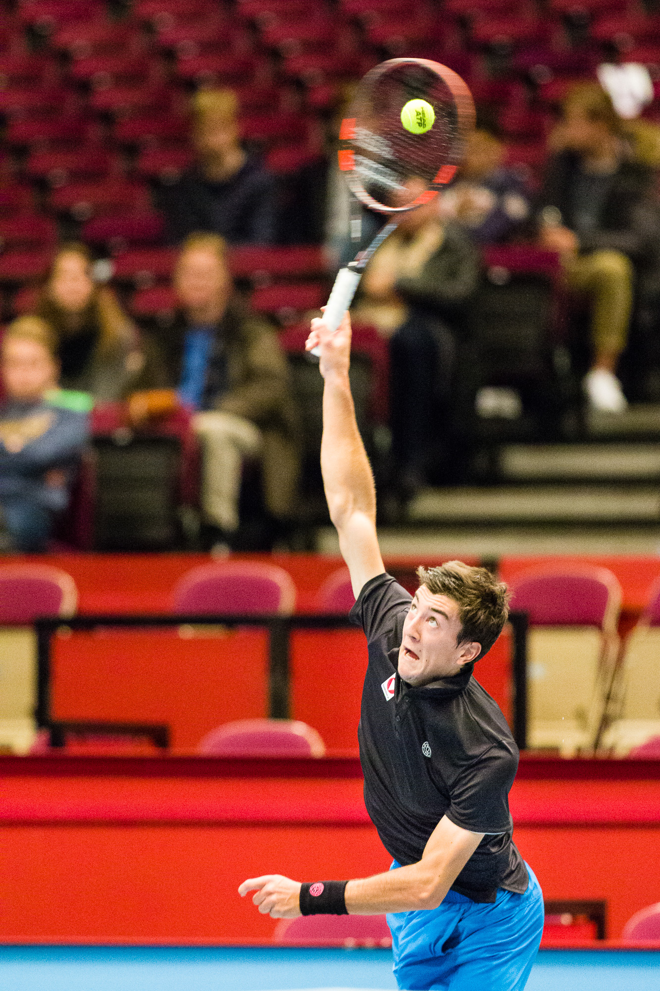 Sebastian Ofner (AUT) spielt gegen Jan-Lennard Struff (GER) in Qualifikation zu Erste Bank Open ATP World Tour 500 in Wien am 23.10.2016